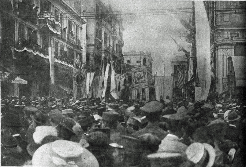 publié dans "le miroir".